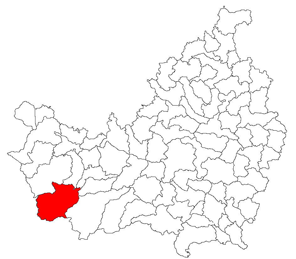 Categorie:Hărţi ale judeţului Cluj